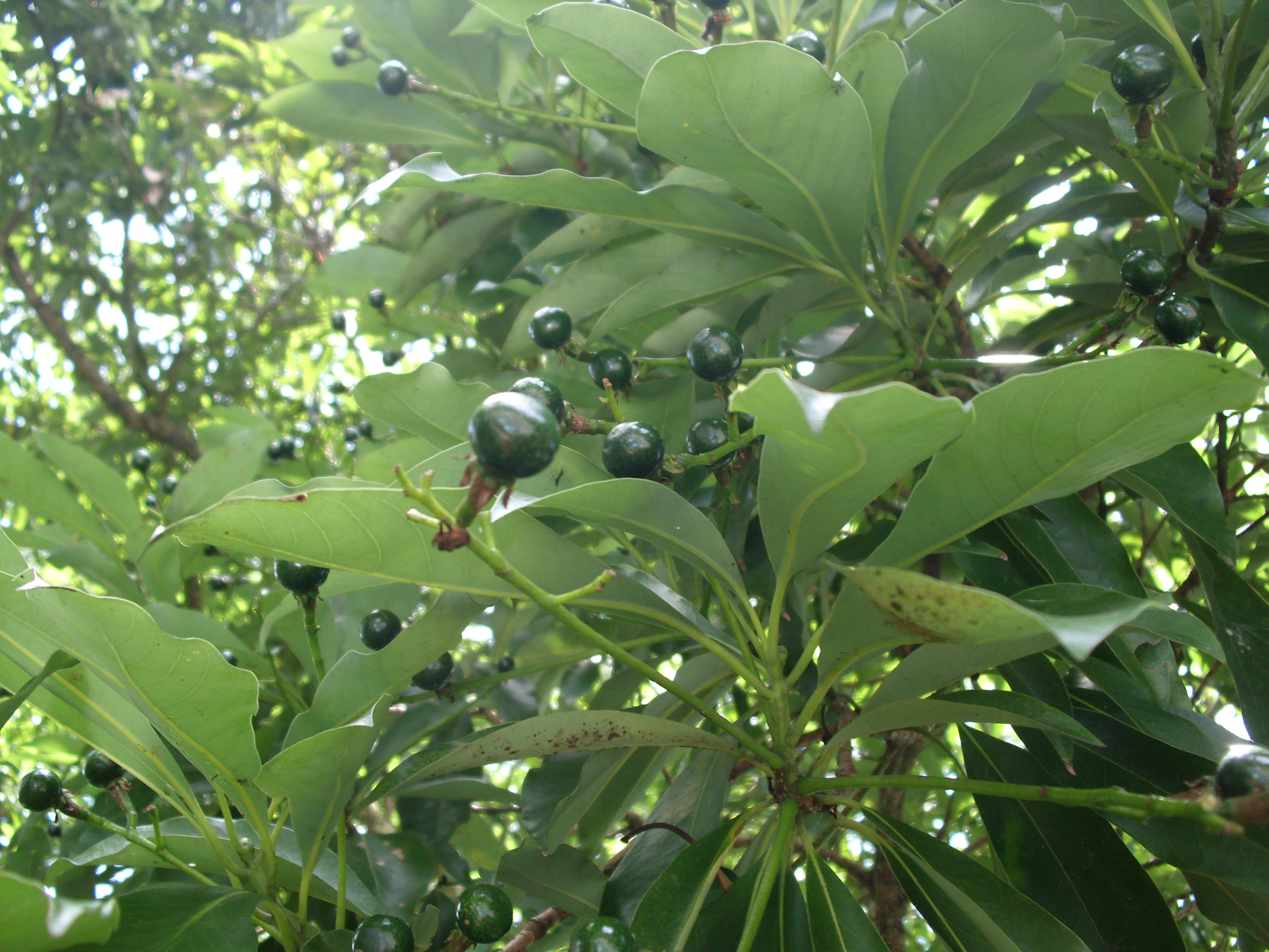 中文（台灣）: 大葉楠。（學名：Machilus japonica Sieb. & Zucc. var. kusanoi (Hayata) Liao），拍攝地點：臺北木柵公園。